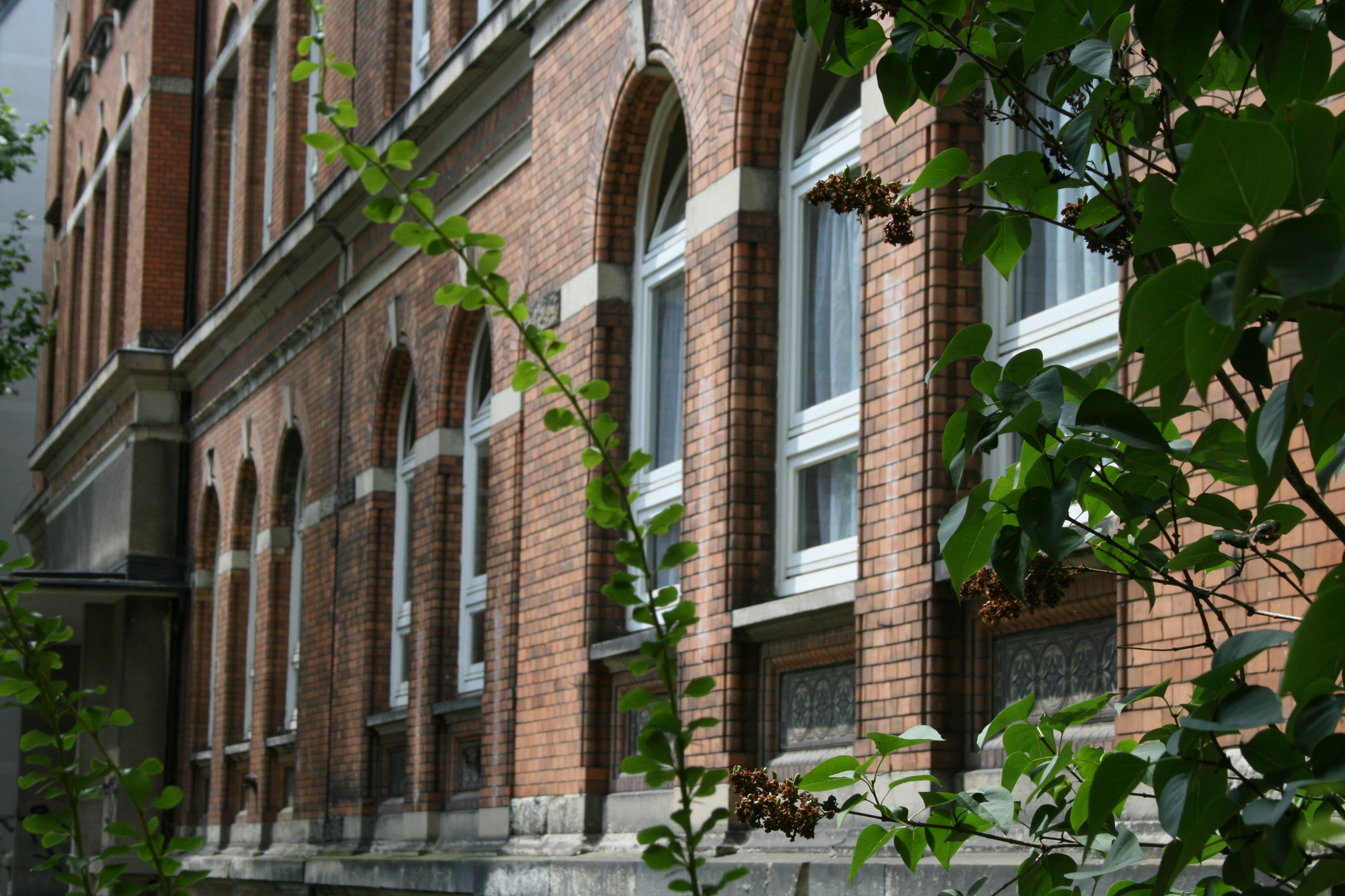 Ehemaliges Wirtschaftsgymnasium Weidenstieg - Berufsschule, erbaut nach Plänen von Carl Johann Christian Zimmermann.This is a photograph of an architectural monument.